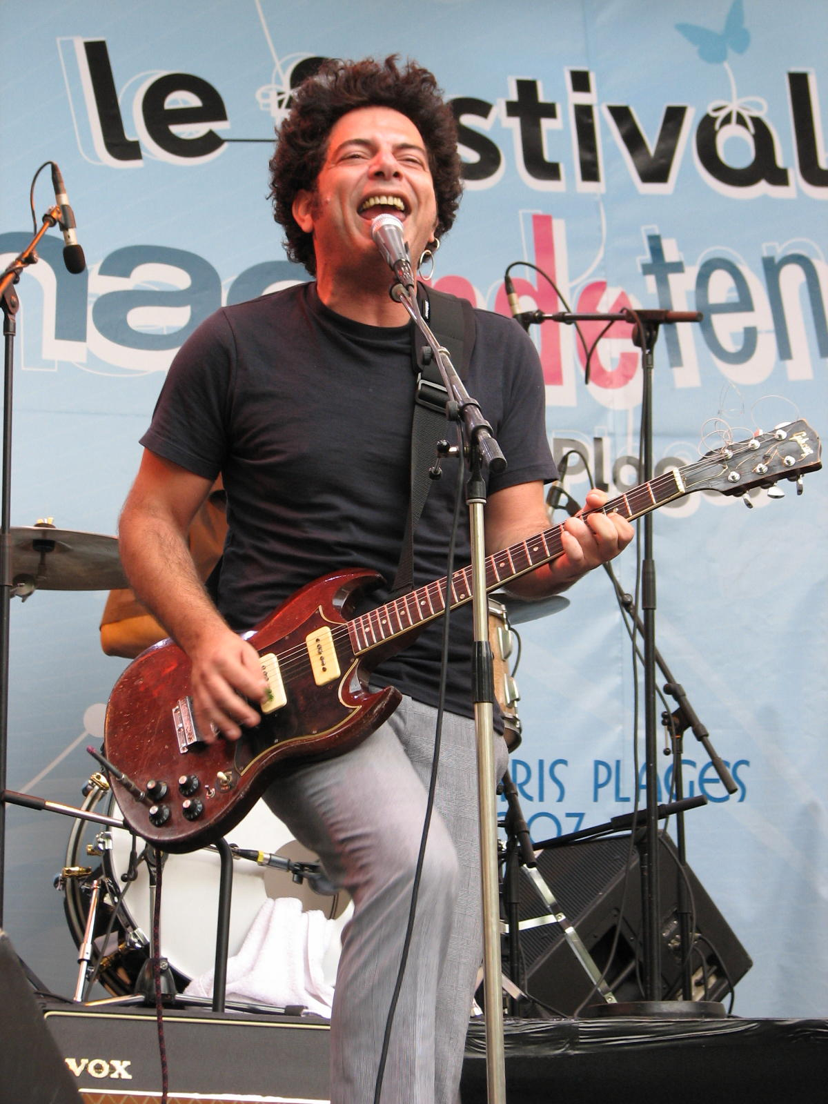 Ran Shem-Tov, chanteur et guitariste du groupe Izabo, en concert à Paris le 18 août 2007